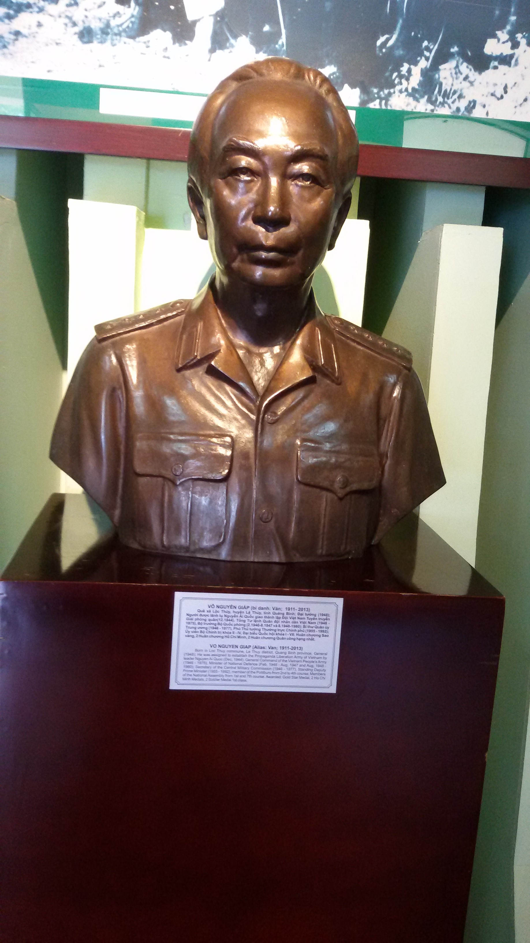 NGuen Giap, Vietnam Military History Museum, Hanoi